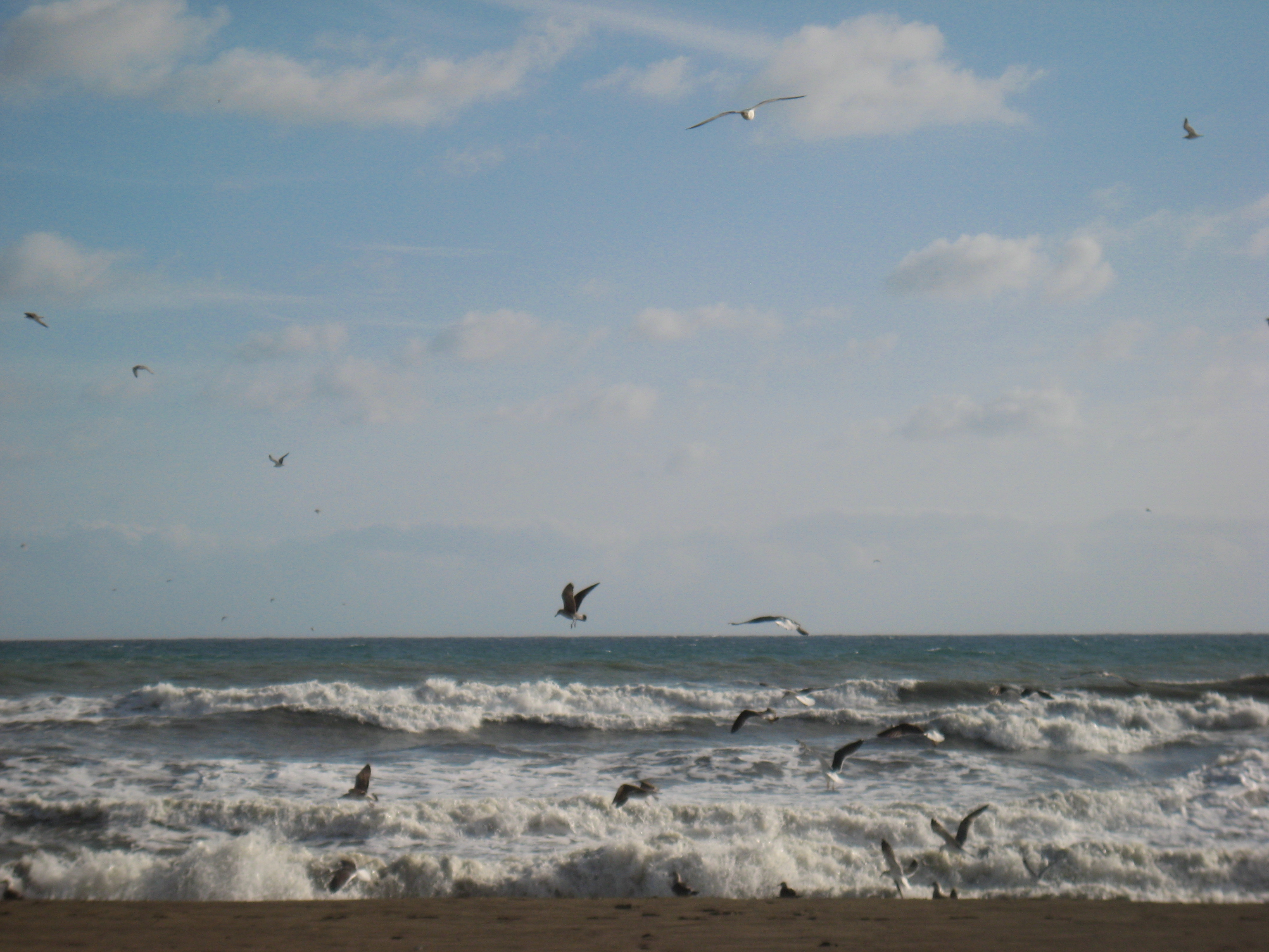 Gaviotas cazando en una playa del Rincón de la Victoria, Málaga, España